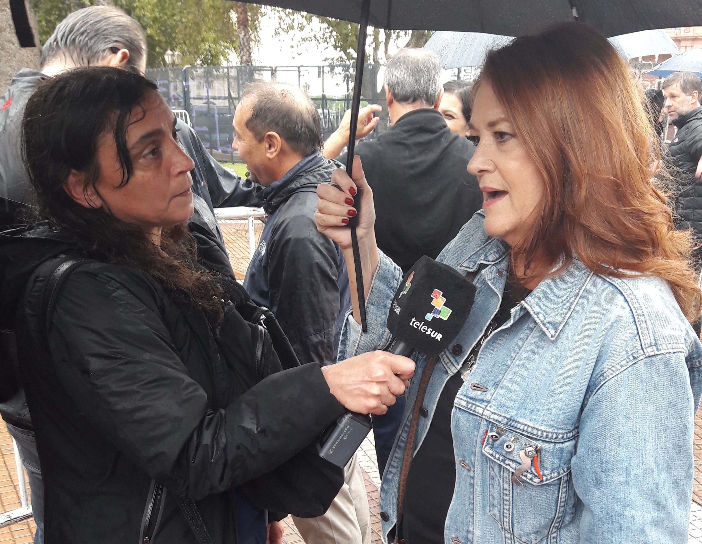 Acto del Día del Veterano y de los Caídos en la Guerra de Malvinas realizado el 2 de abril de 2017 en Plaza de Mayo, Buenos Aires. Participaron ex combatientes, militantes kirchneristas, demás peronistas y de izquierda.